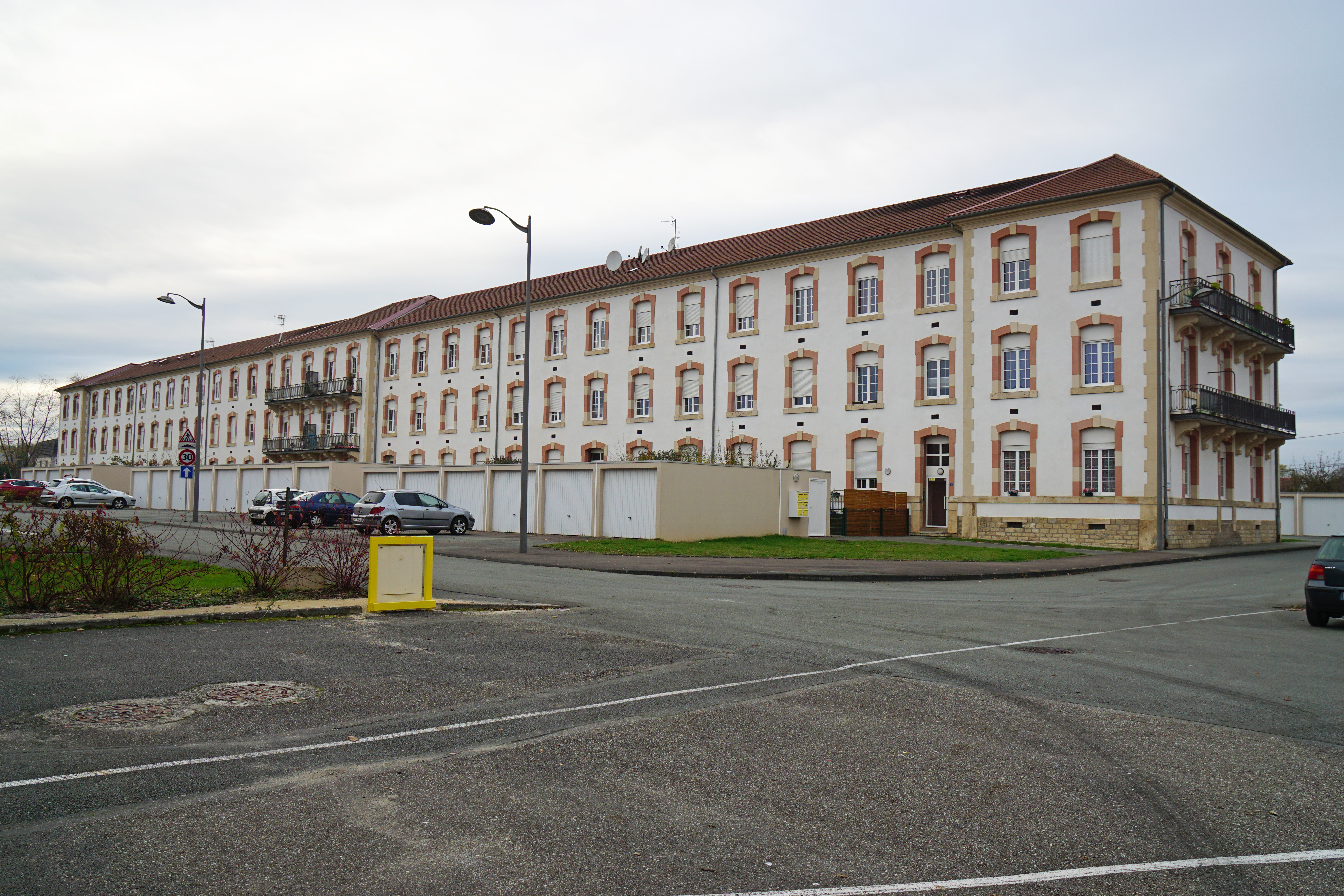 Ancienne caserne militaire d'Héricourt (Haute-Saône).